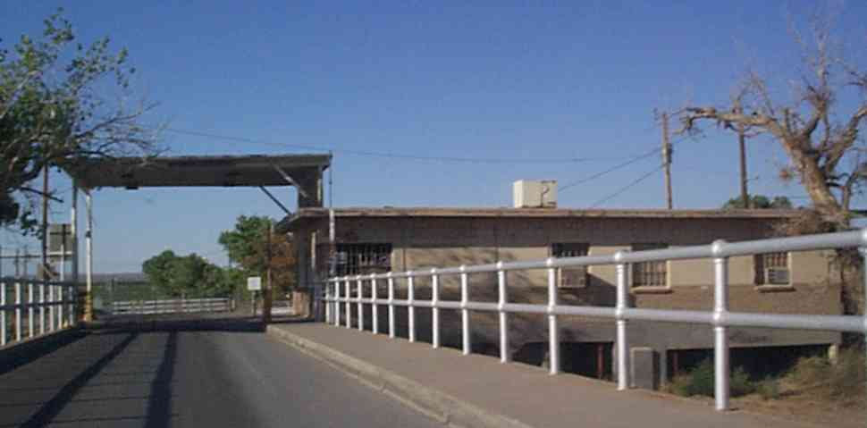 Fabens TX old border station